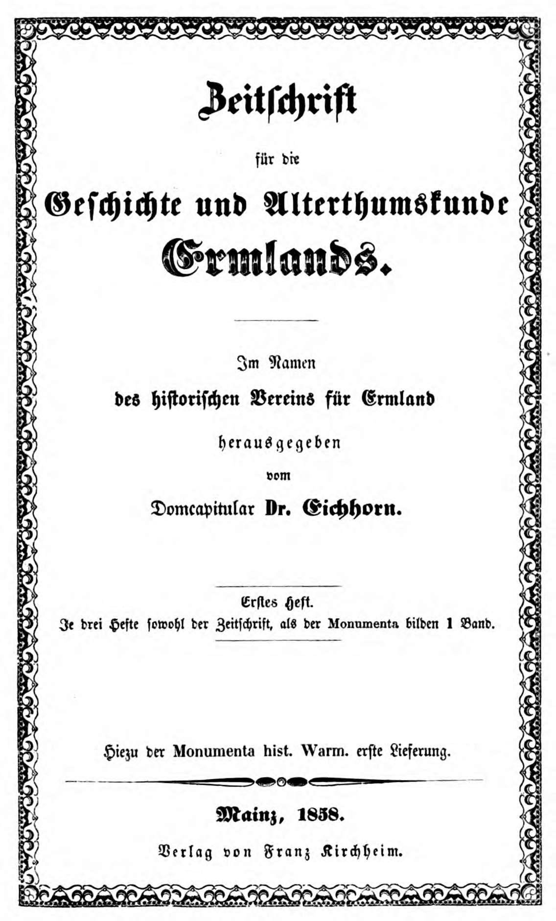 Titelseite der Zeitschrift / Title page of the periodical